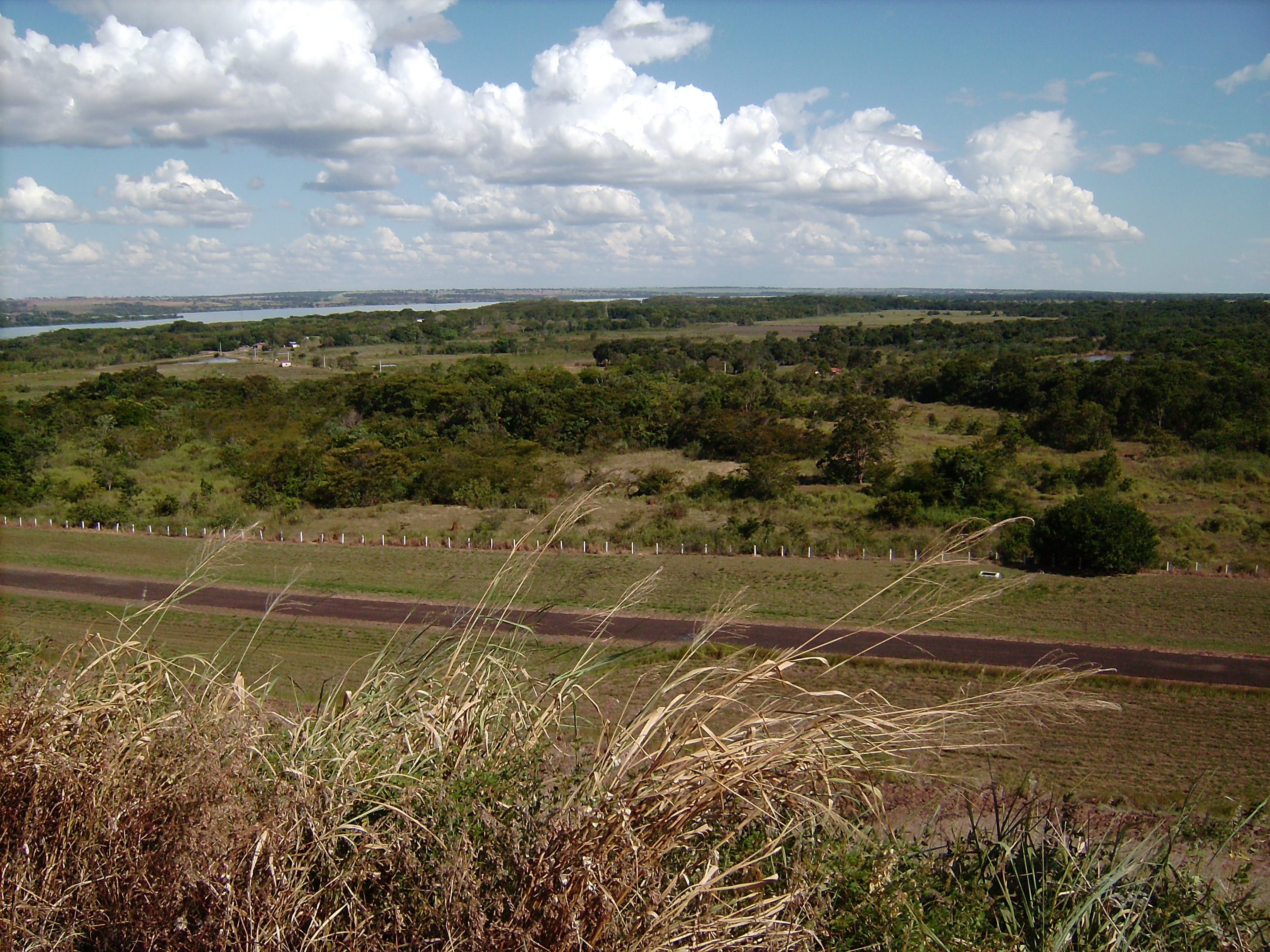 Selvíria, State of Mato Grosso do Sul, Brazil